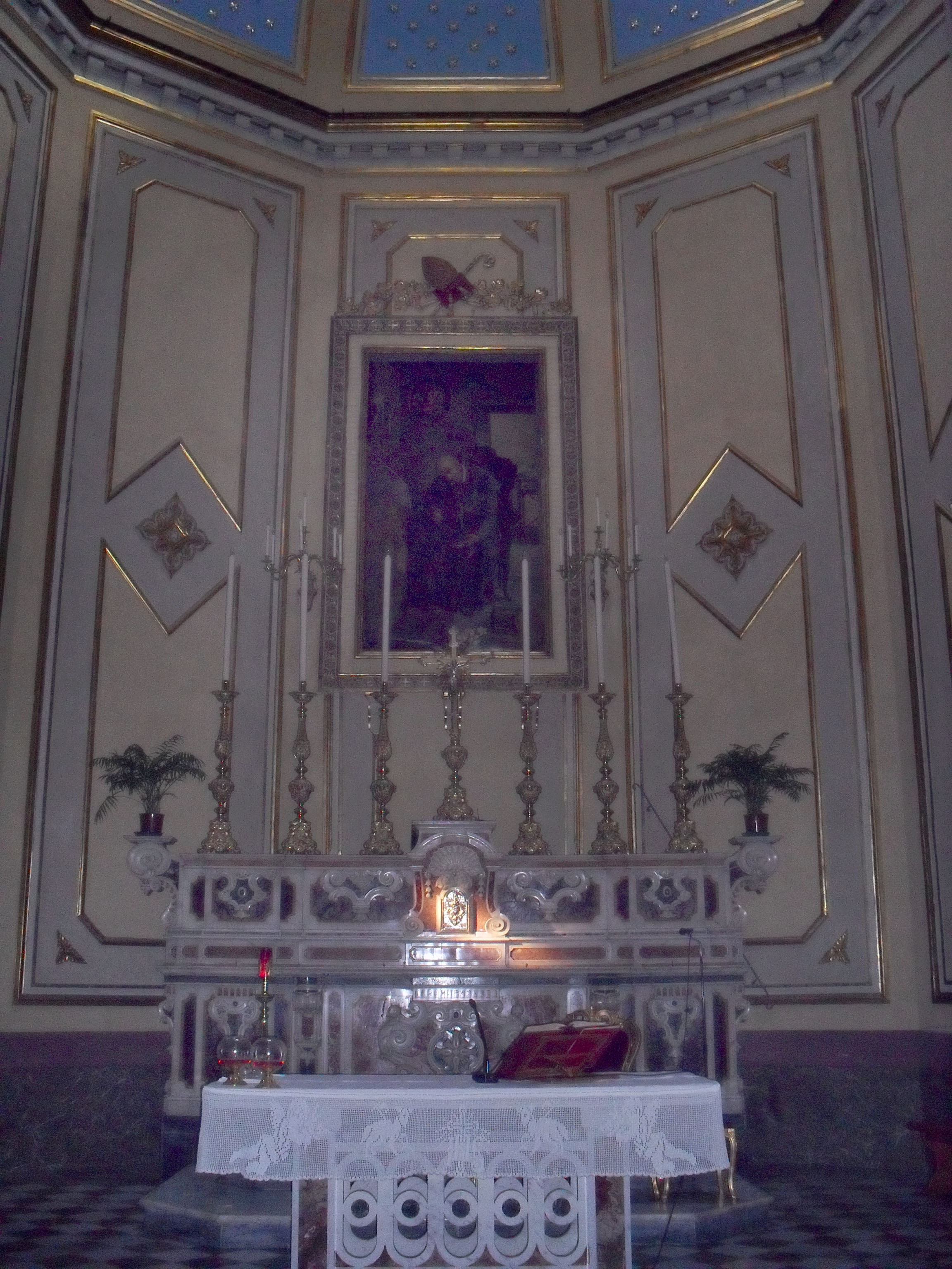 Chiesa di Sant'Alfonso all'Arenaccia (Napoli)